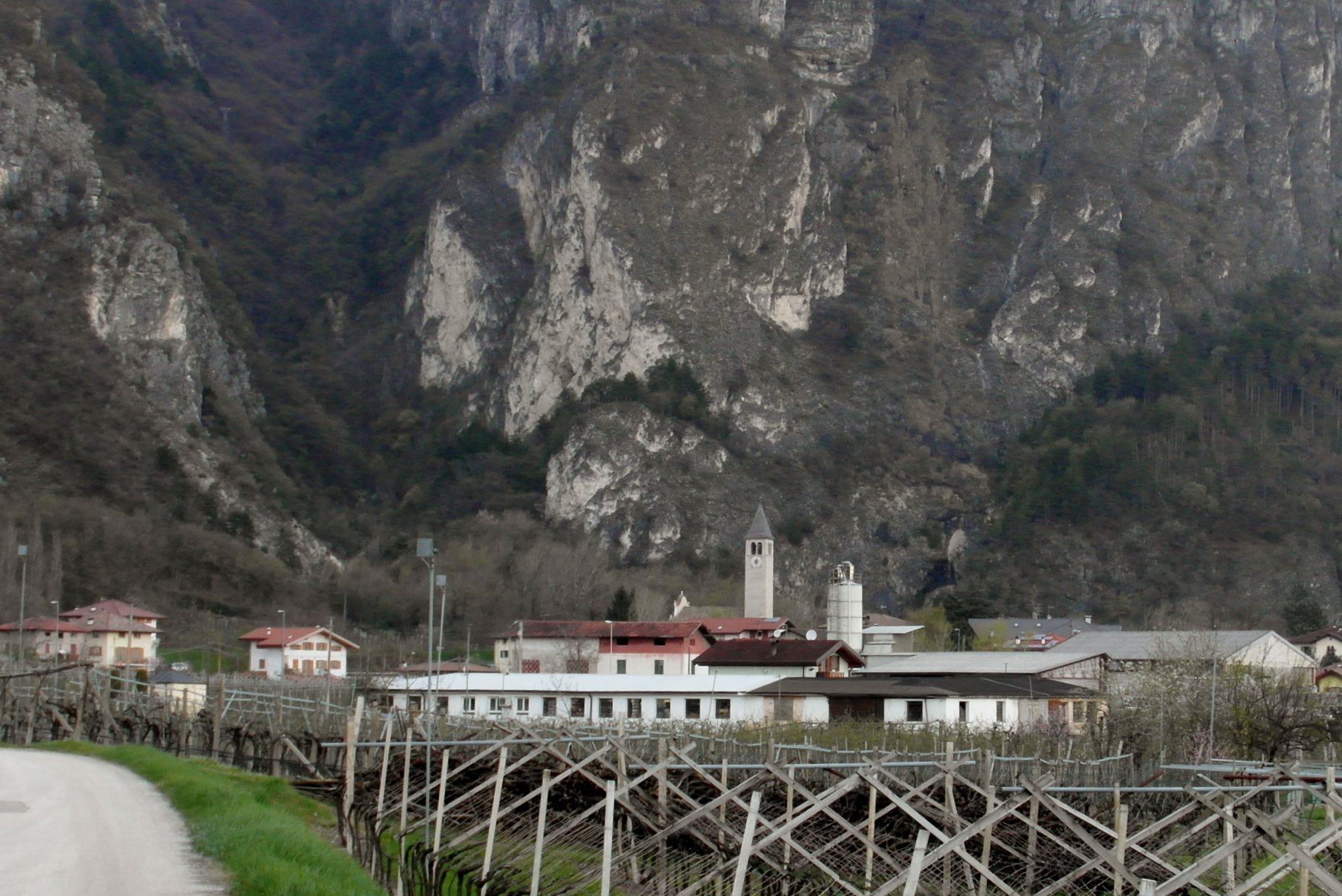 Zambana